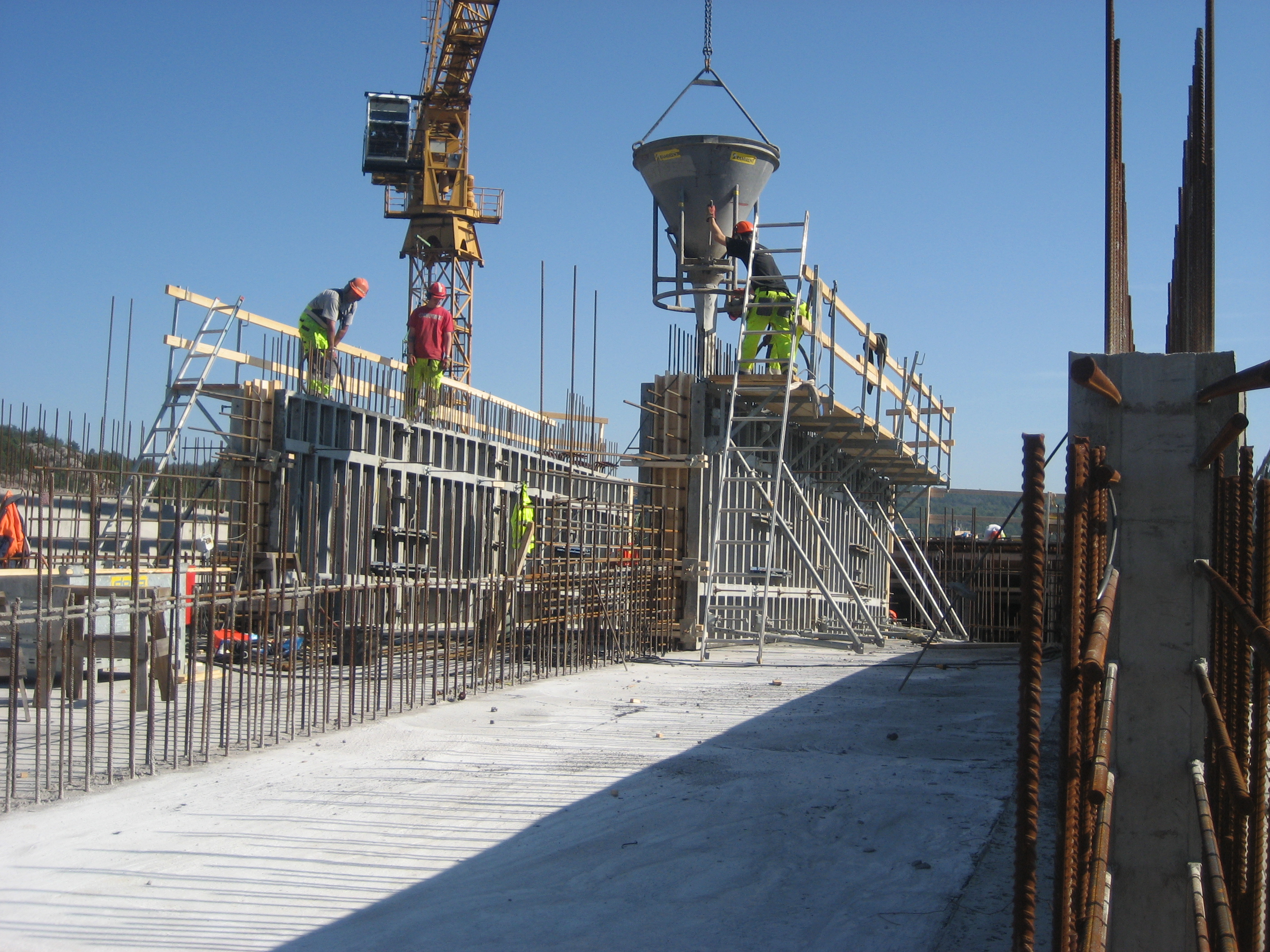 Image Ørekils Bridge